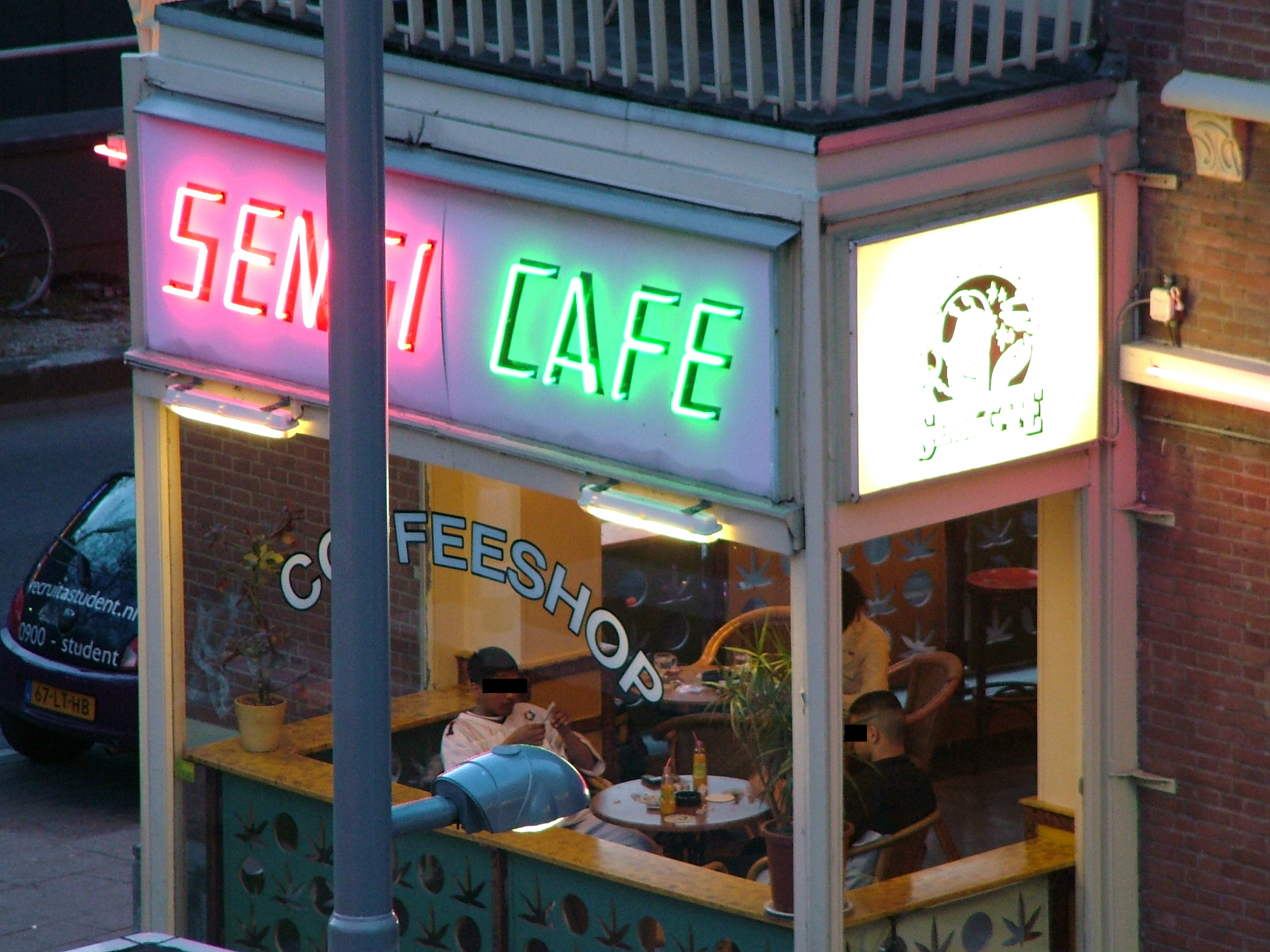 Coffee shop in Rotterdam, Nieuwe Binnenweg